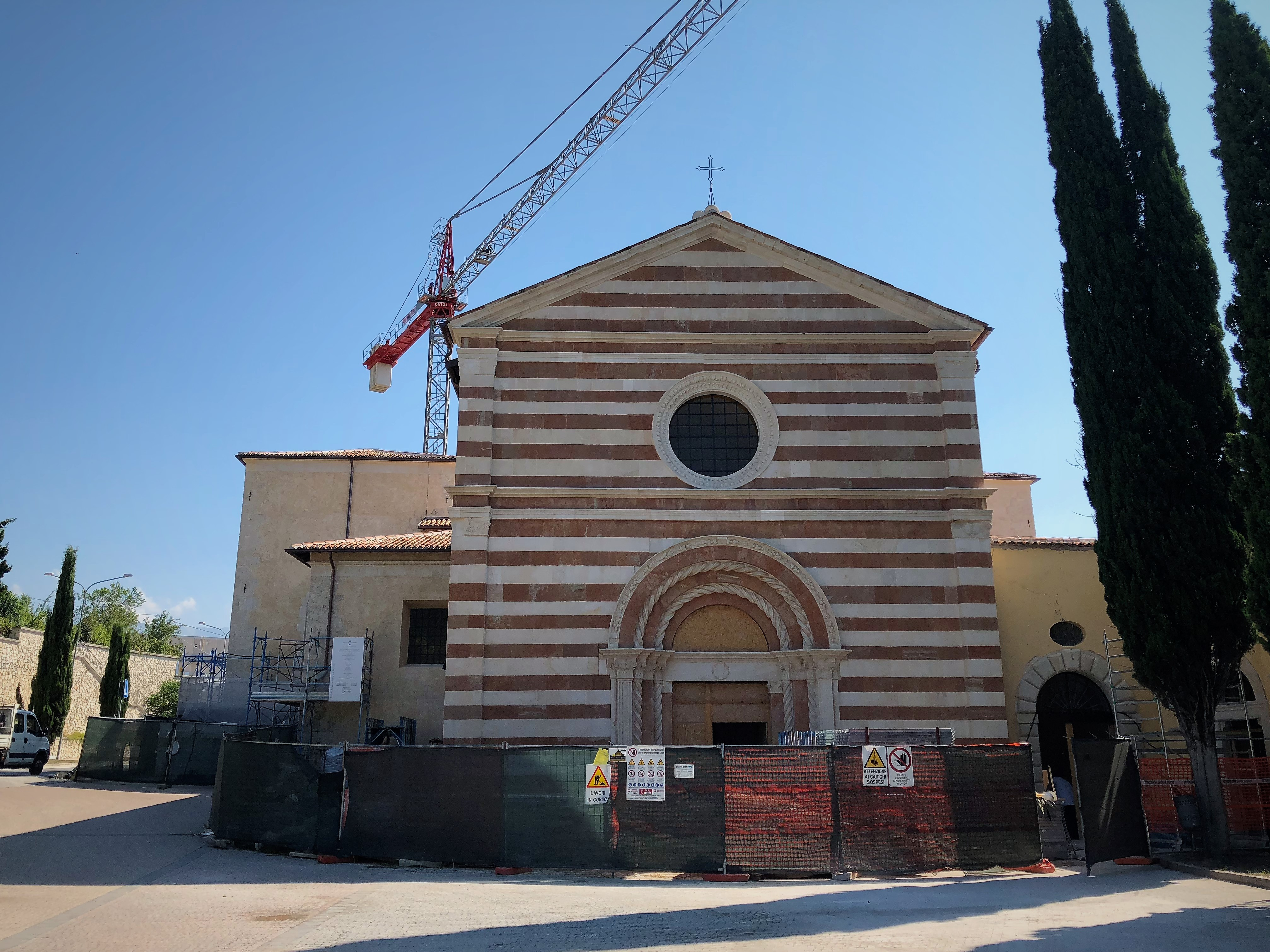 Chiesa di Santa Maria del Soccorso in L'Aquila nel 2018, durante i lavori di riparazione.